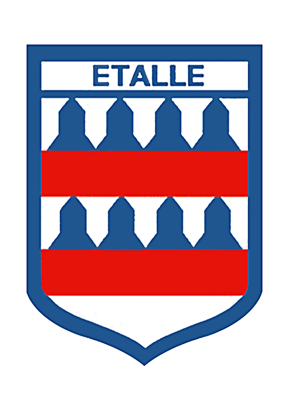 Fascé de vair et de gueules de quatre pièces à la plaine d'argent.